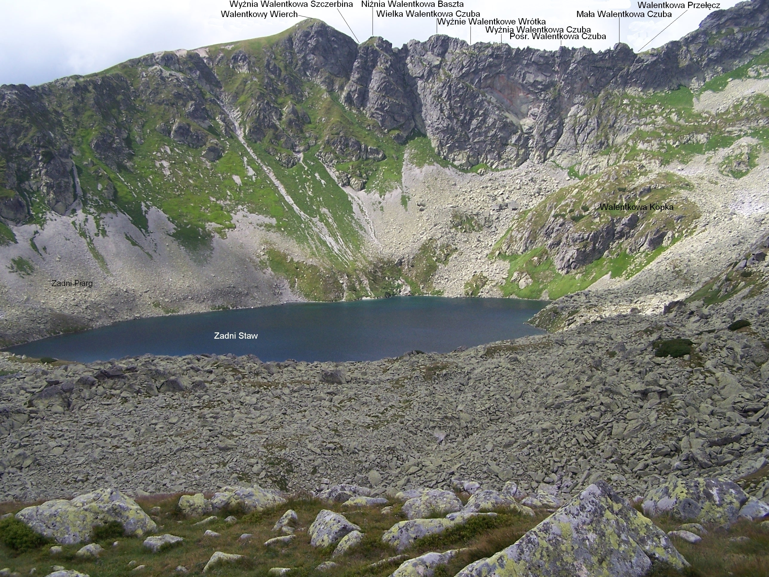 Walentkowa Gran